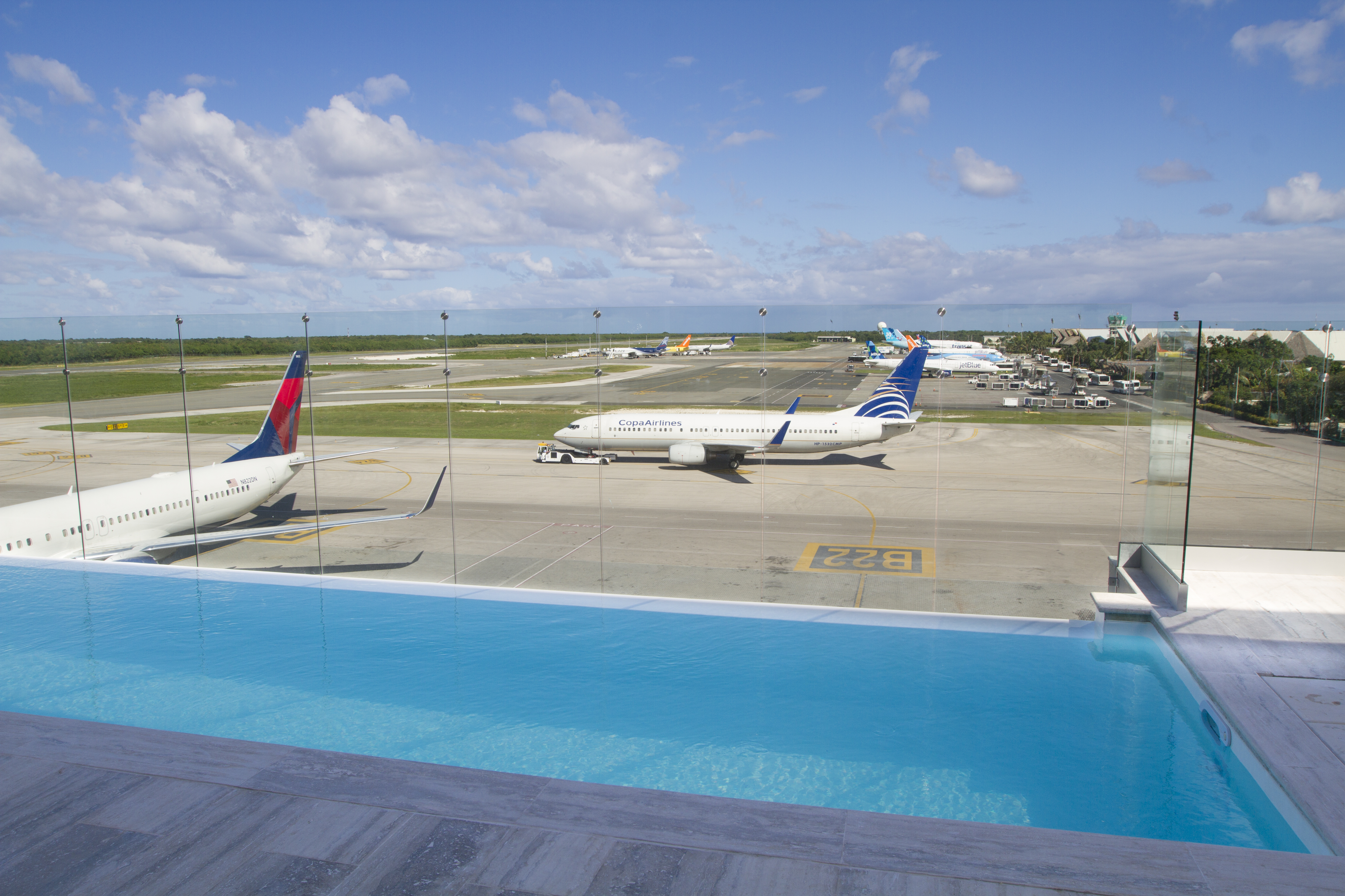 Salón VIP, Terminal B - Aeropuerto Internacional de Punta Cana